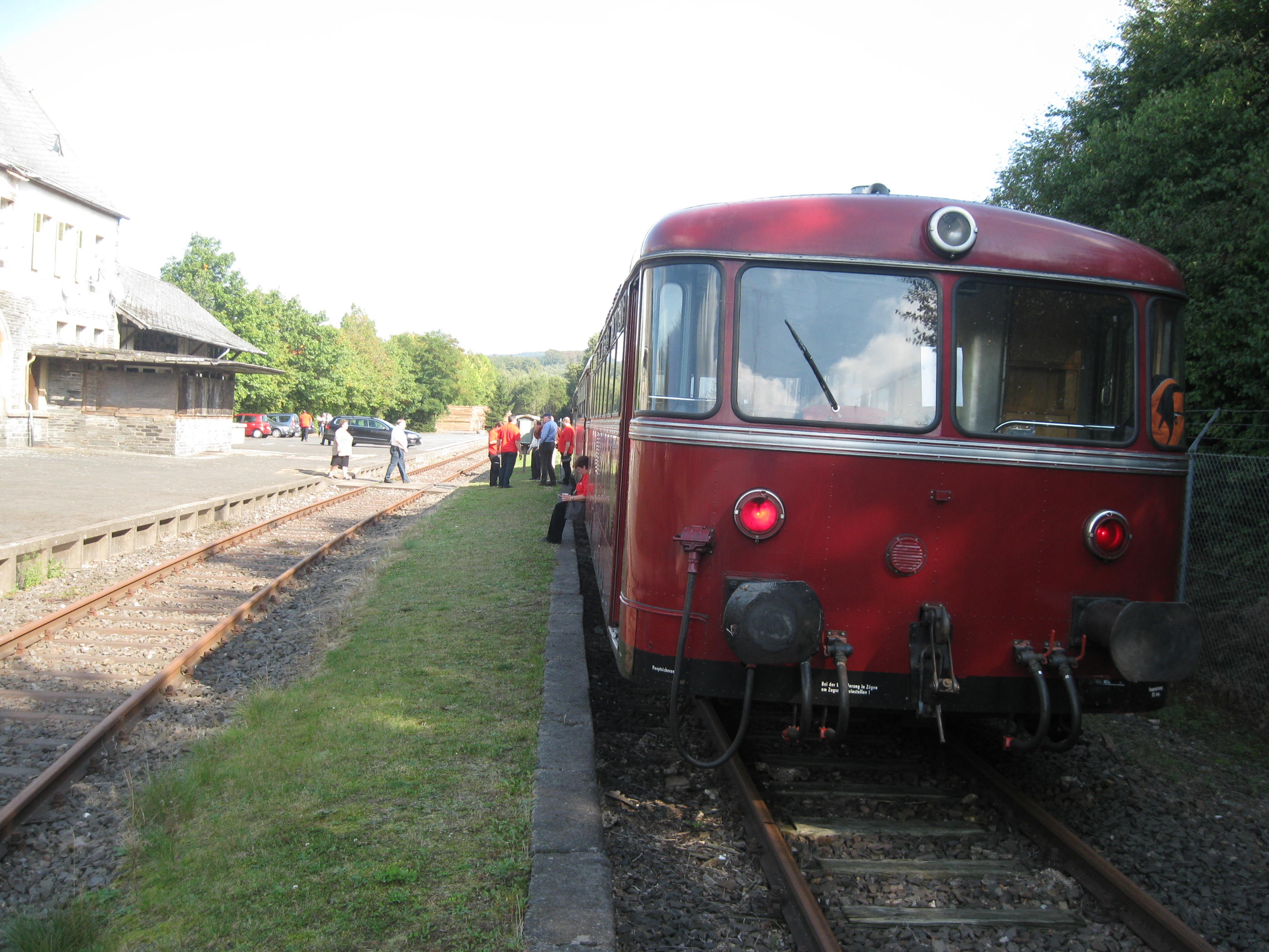 Bahnhof Morbach mit rotem Schienenbus, Bahnhof links im Bild